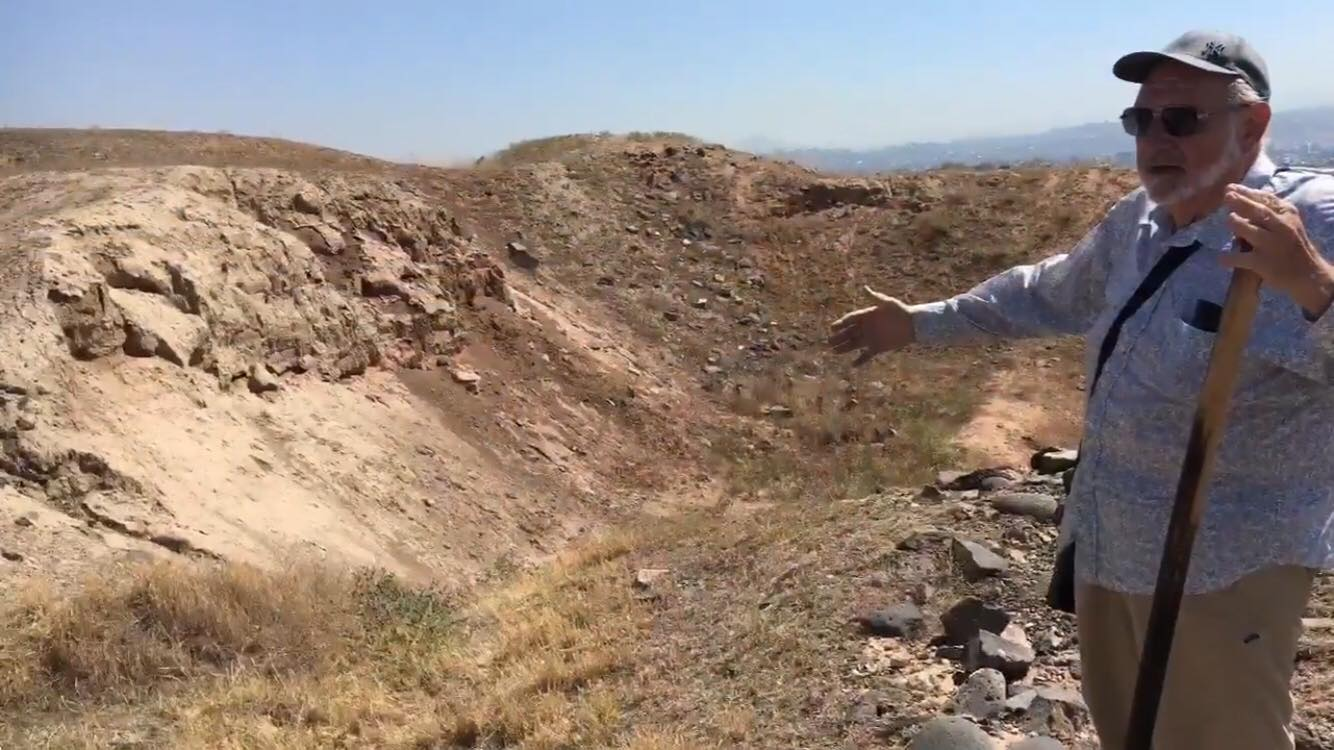 The image of Armenian-American archeologist and historian Gregory Areshian